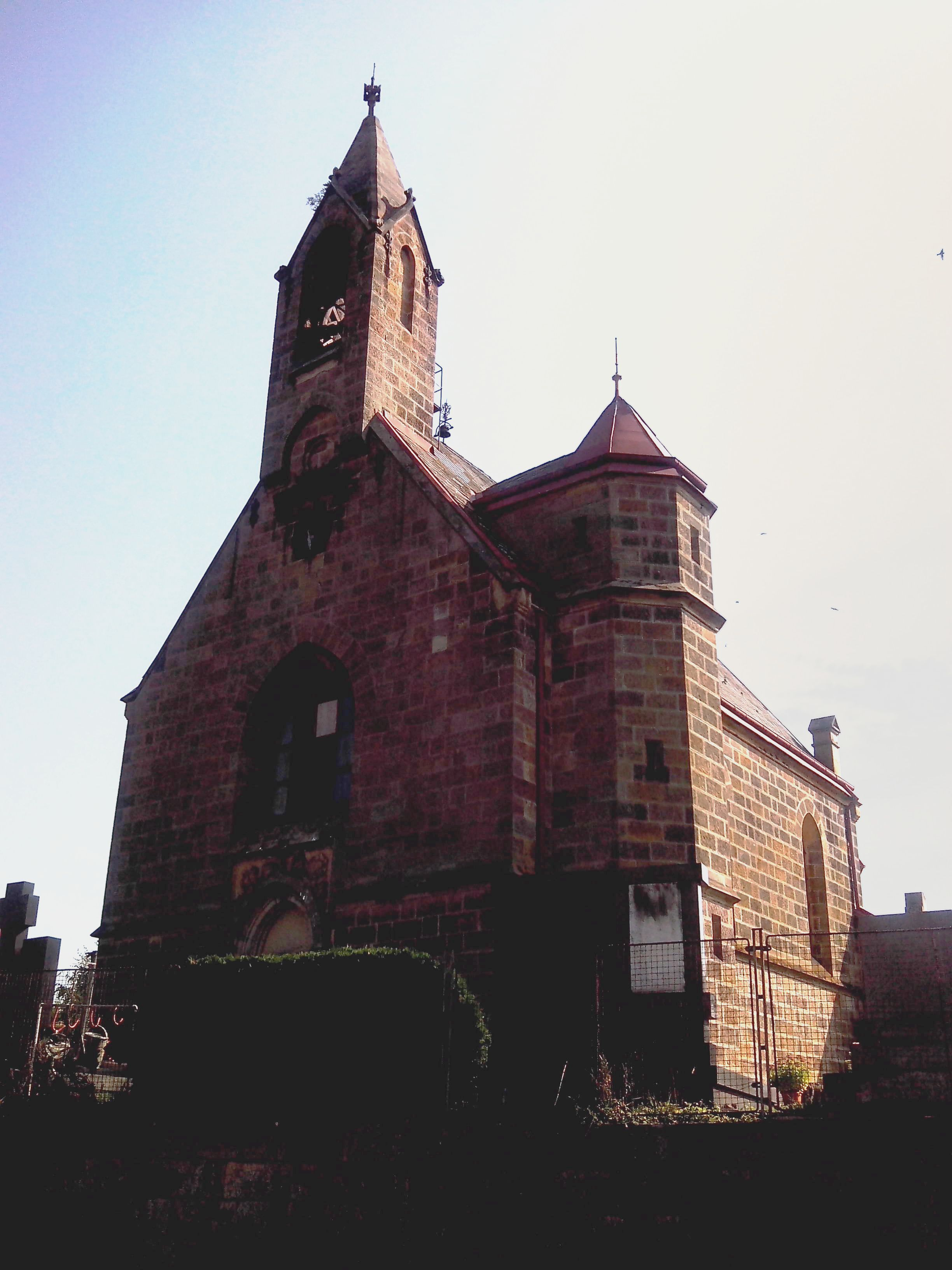 Svatojanský Újezd - kostel sv. Jana Křtitele